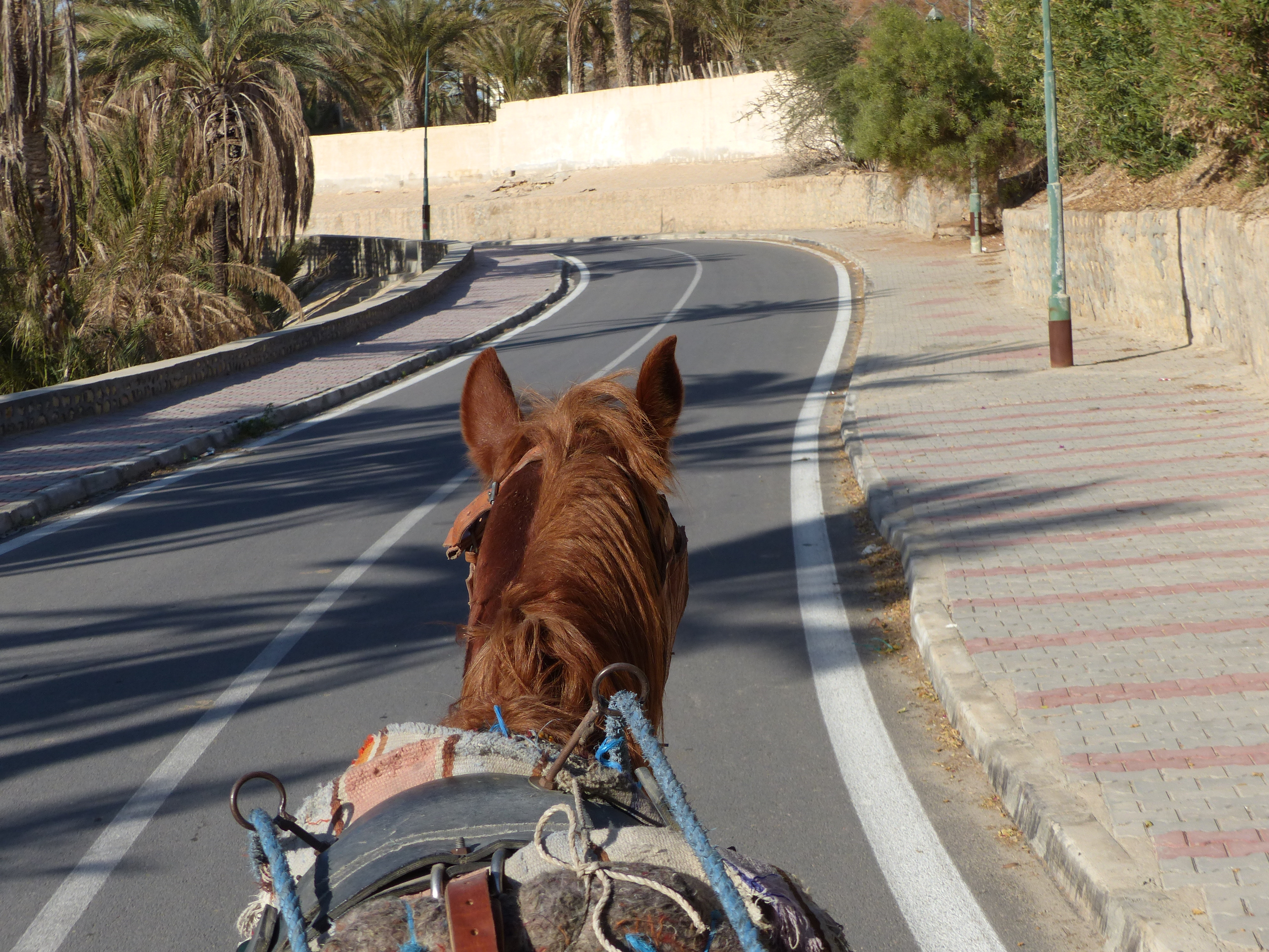 Vue sur la route de Tozeur depuis un attelage This is an image with the theme "Africa on the Move or Transport" from: Tunisia